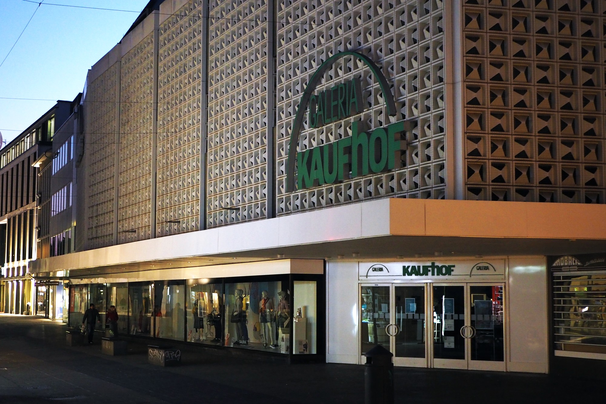 Galeria Kaufhof, Trier, Fleischstraße 68-76. Ehemals Horten; beachte die Fassadengestaltung mit sog. Horten-Kacheln.